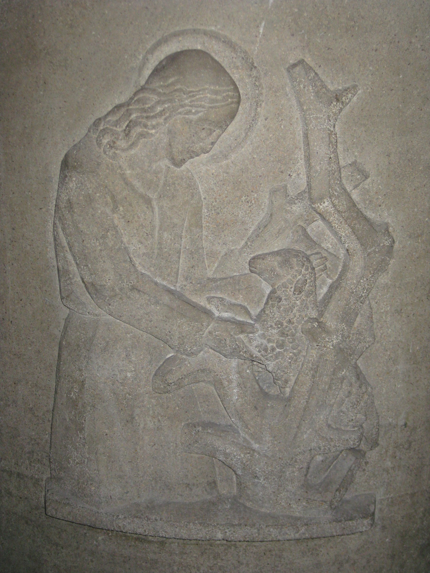 Taufbrunnenrelief Verlorenes Schaf von Adolf Wagner von der Mühl aus dem Jahre 1938 in der Pfarrkirche St. Jakob St. Josef in Wien-Floridsdorf.